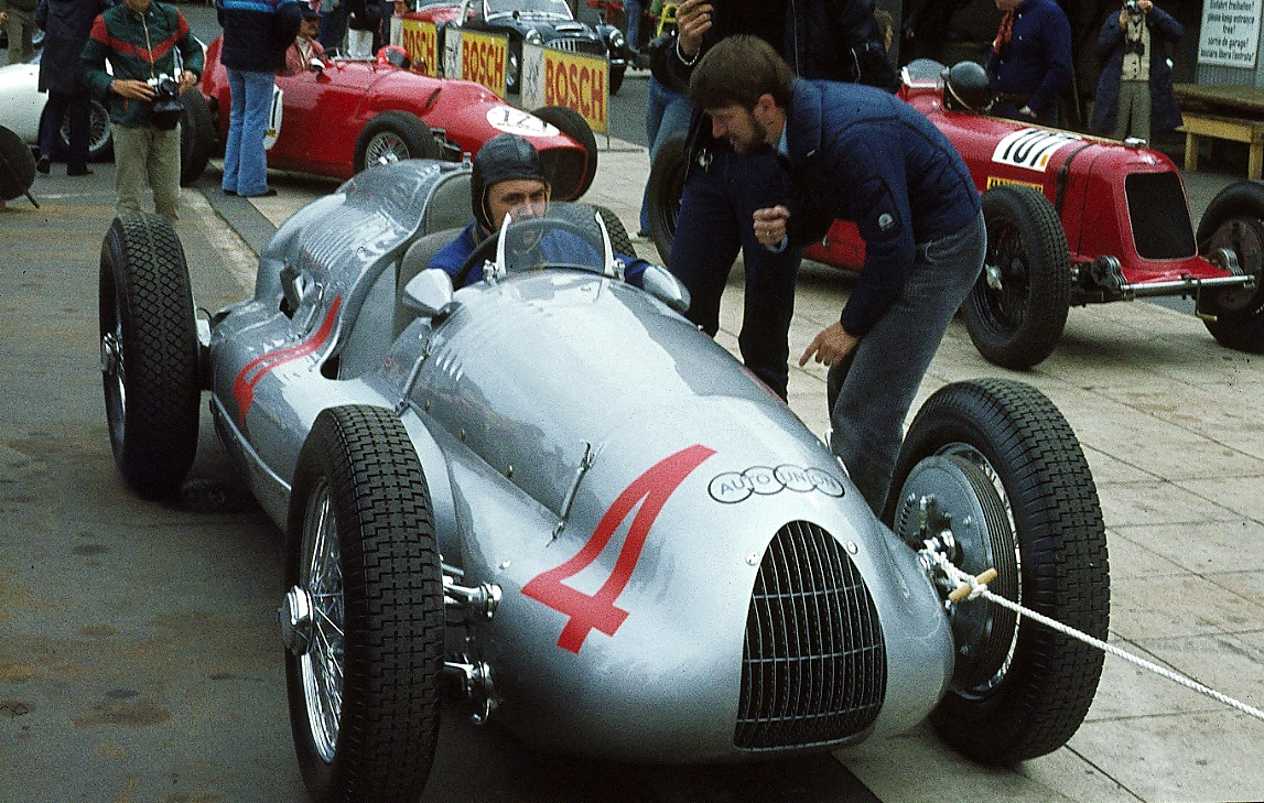 Bildbeschreibung: Auto Union Rennwagen Typ D Fotograf: Lothar Spurzem Datum: 10.08.1979 im Fahrerlager des Nürburgrings